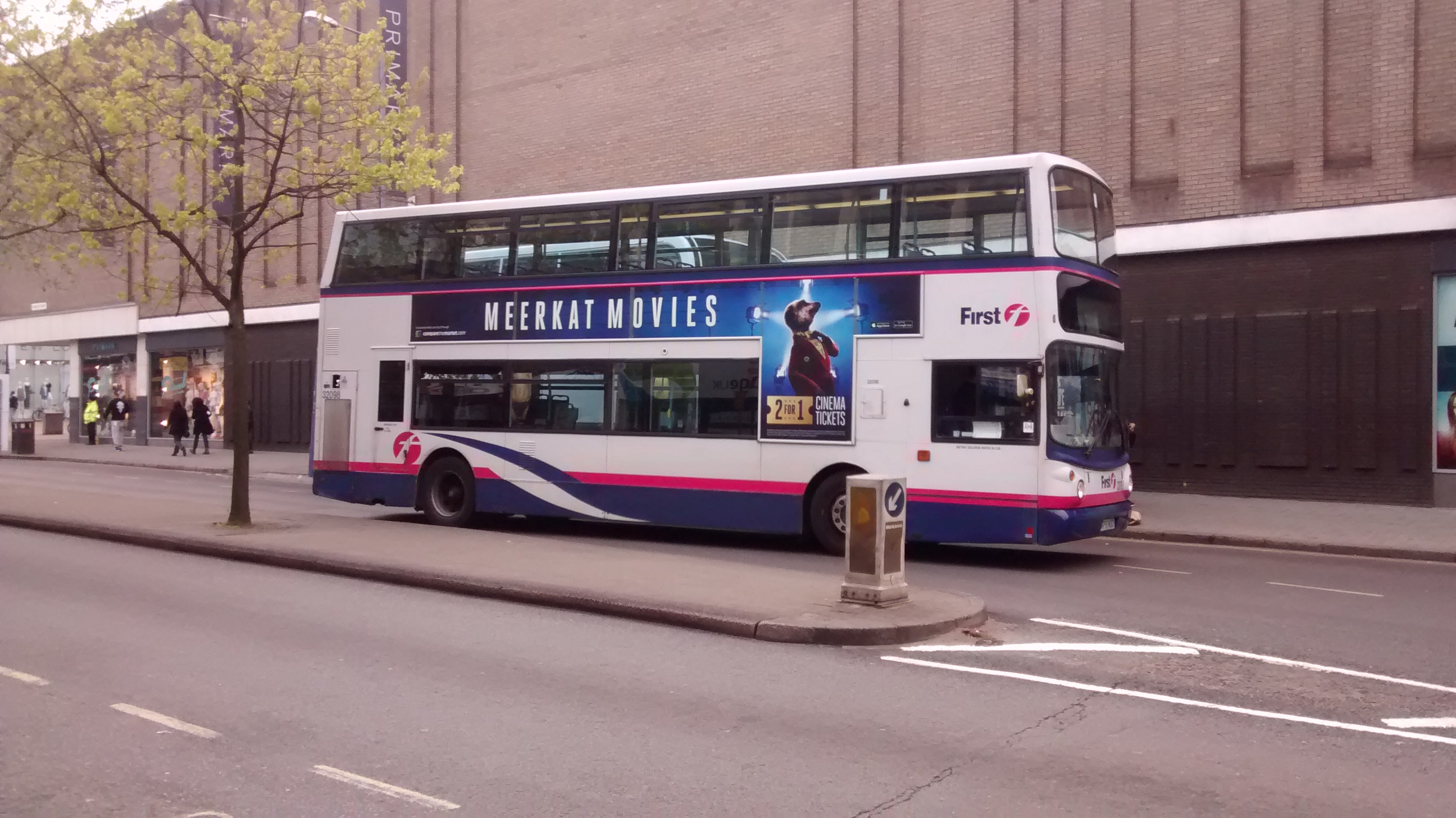 Autobus lini First